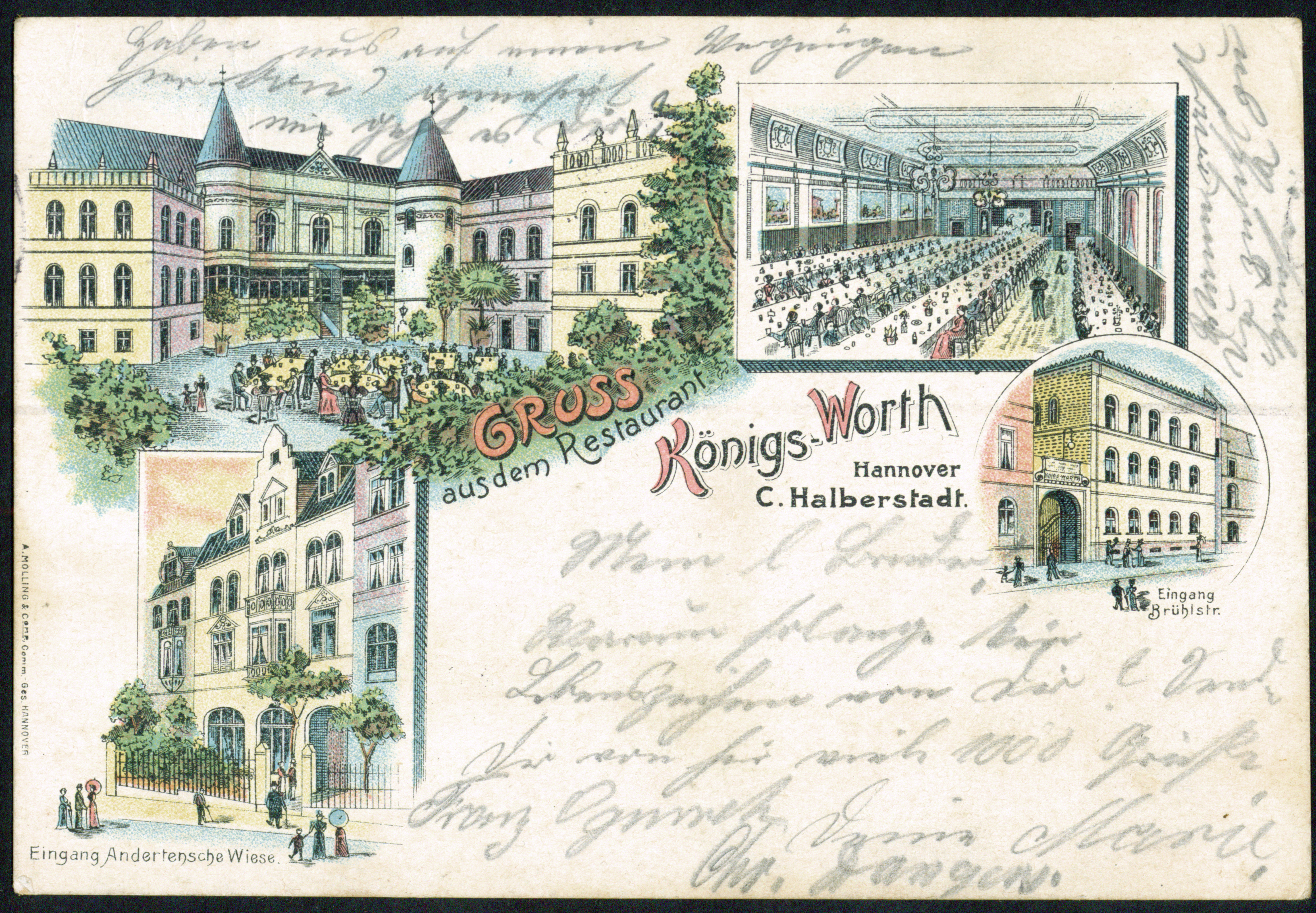 Lithografierte Ansichtskarte von A. Molling & Comp. mit einem "Gruß aus dem Restaurant Königs-Worth Hannover C. Halberstadt", einer Abbildung des Eingangs Andertensche Wiese und der Bühlstraße sowie eine Innen- und Gartenansicht der offenbar großräumigen Vergnügungs-Lokalität ...